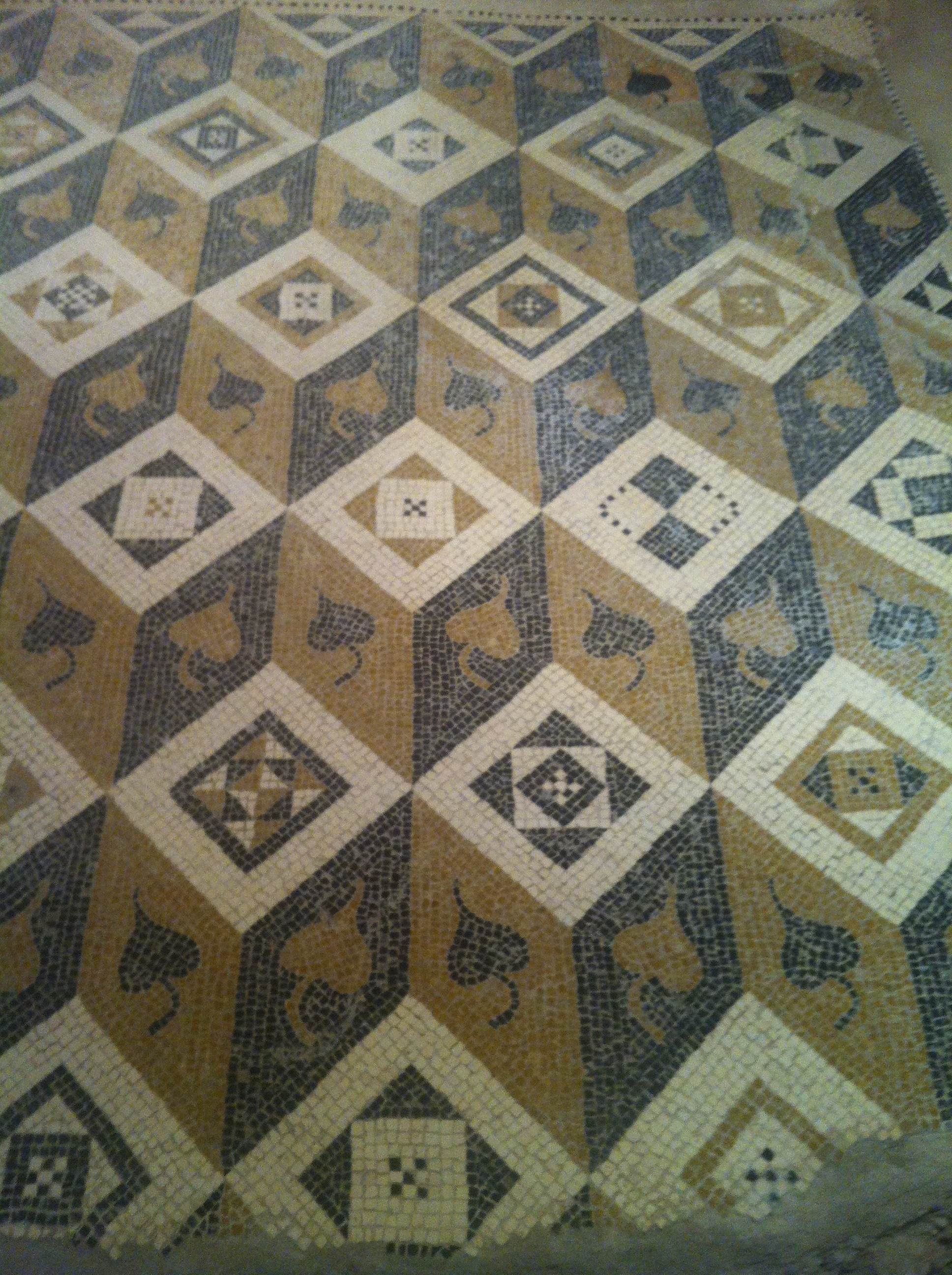 Mosaicos romanos en Orbe